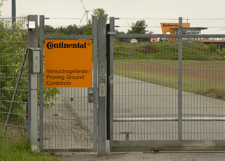 Eingang Contidrom